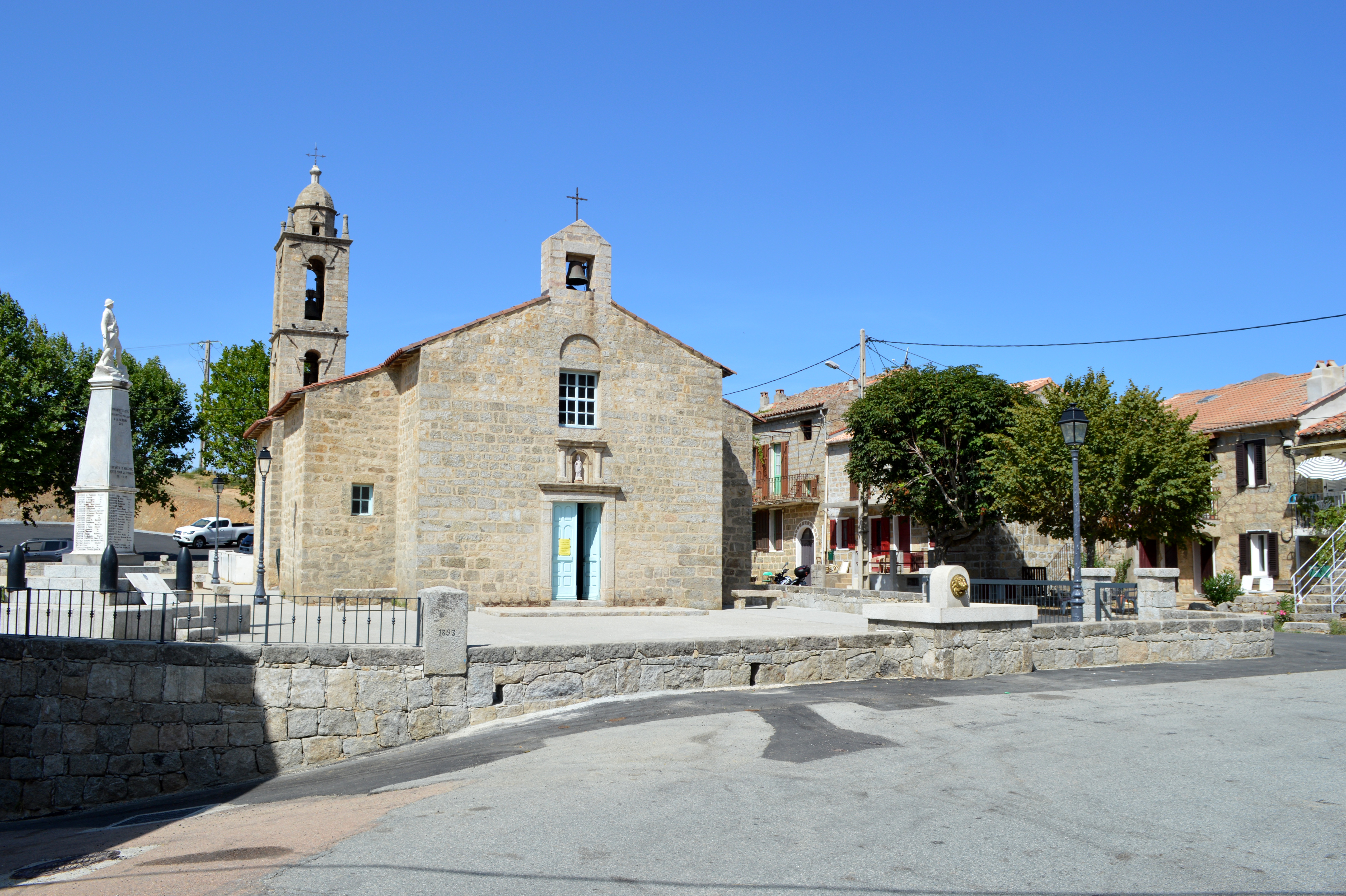 Place et église du village corse d'Aullène